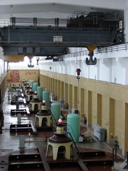 Машинный зал Новосибирской ГЭС